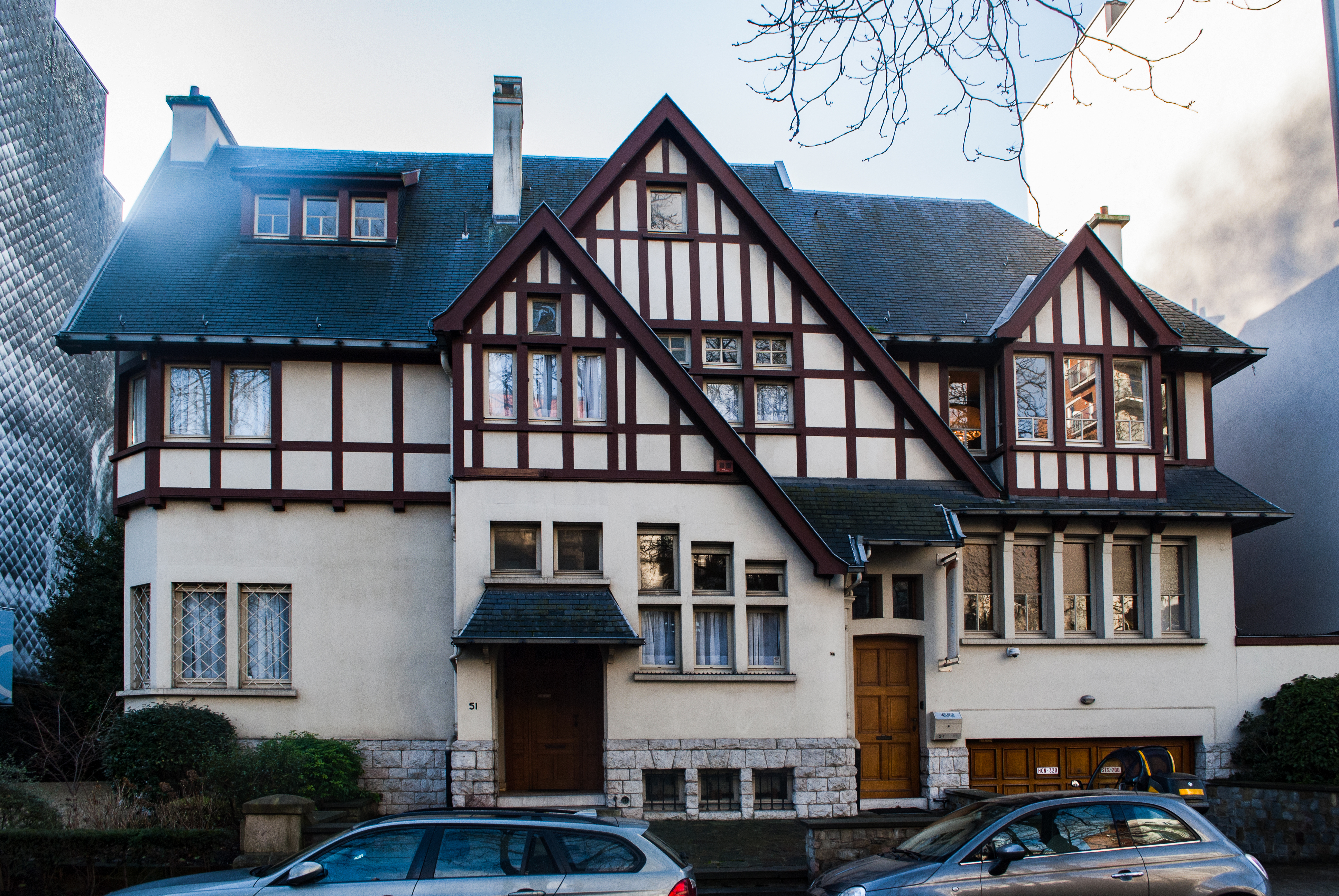 Maison